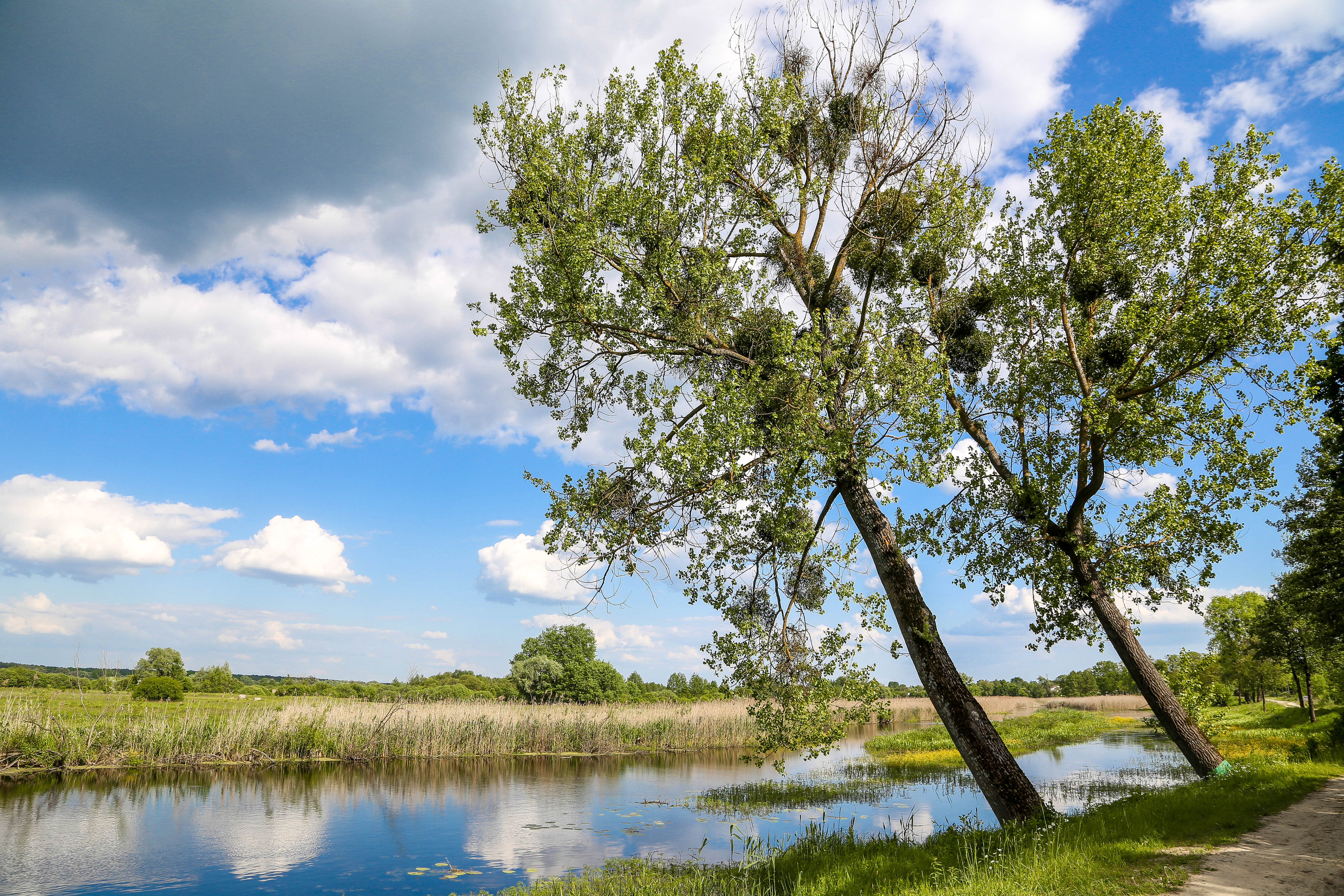 Starorzecze Bugu w okolicach Dorohuska